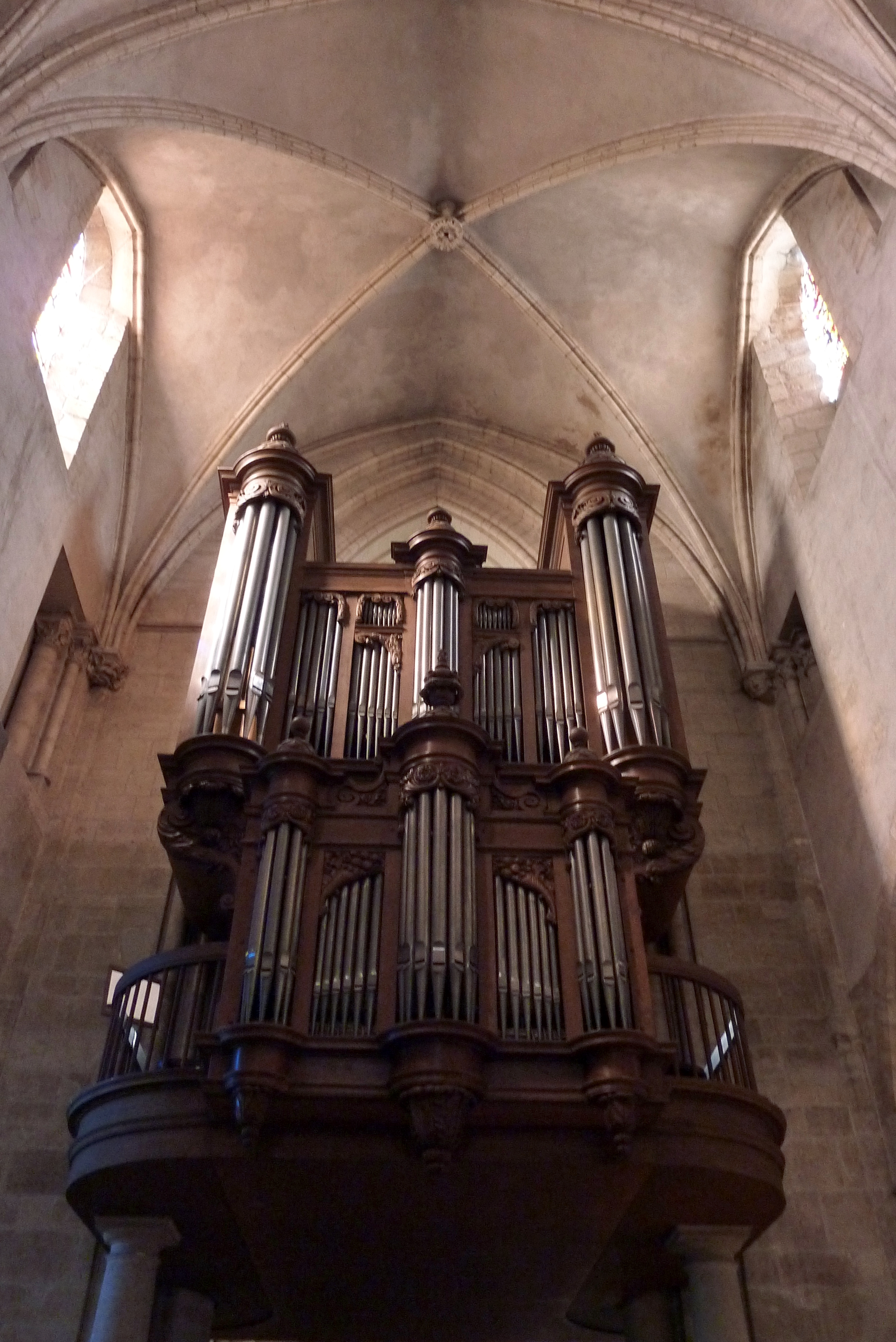 Kathedrale Saint-Spire in Corbeil-Essonnes im Département Essonne (Île-de-France), Orgel